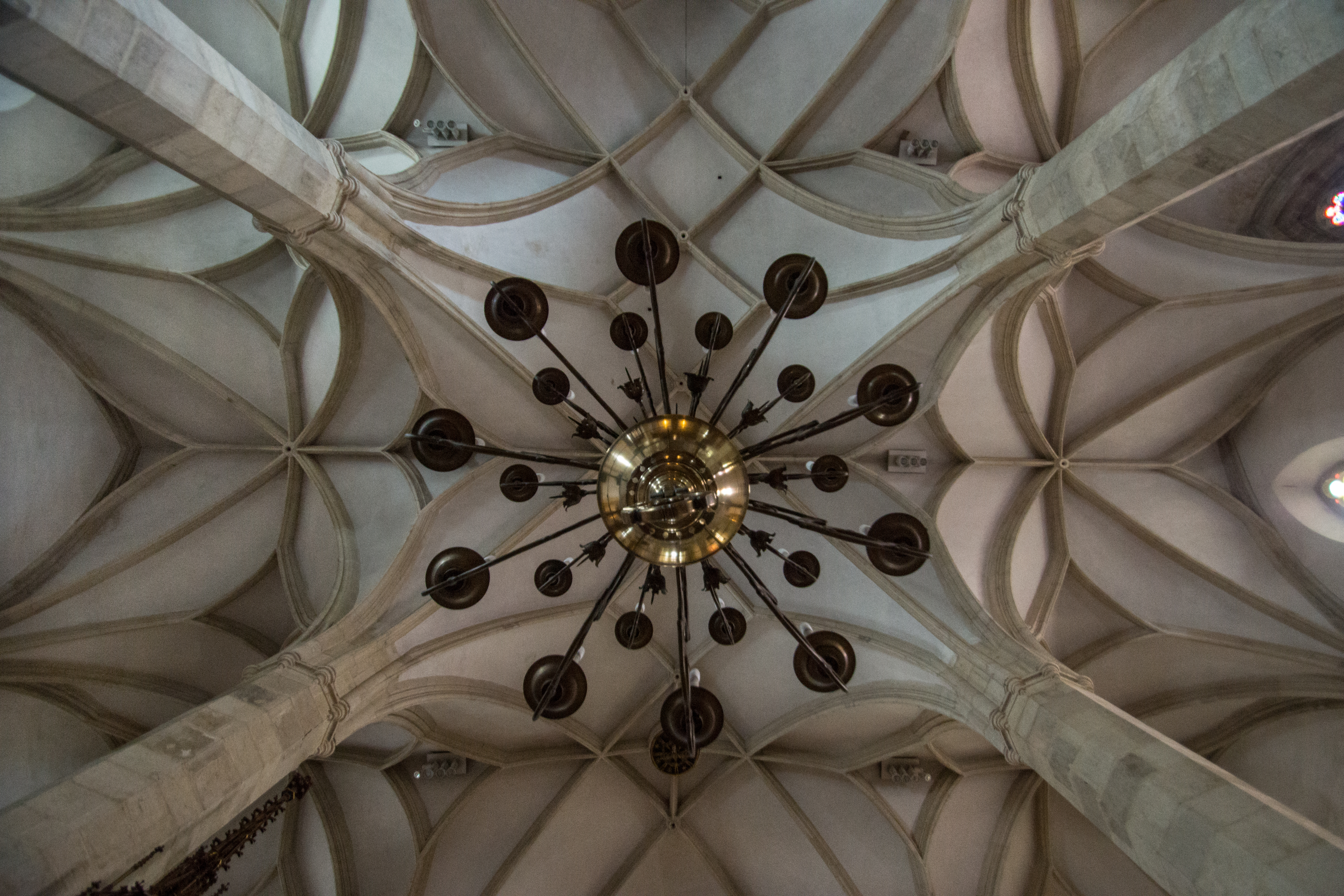 Catedral de San Martin. Lampara.